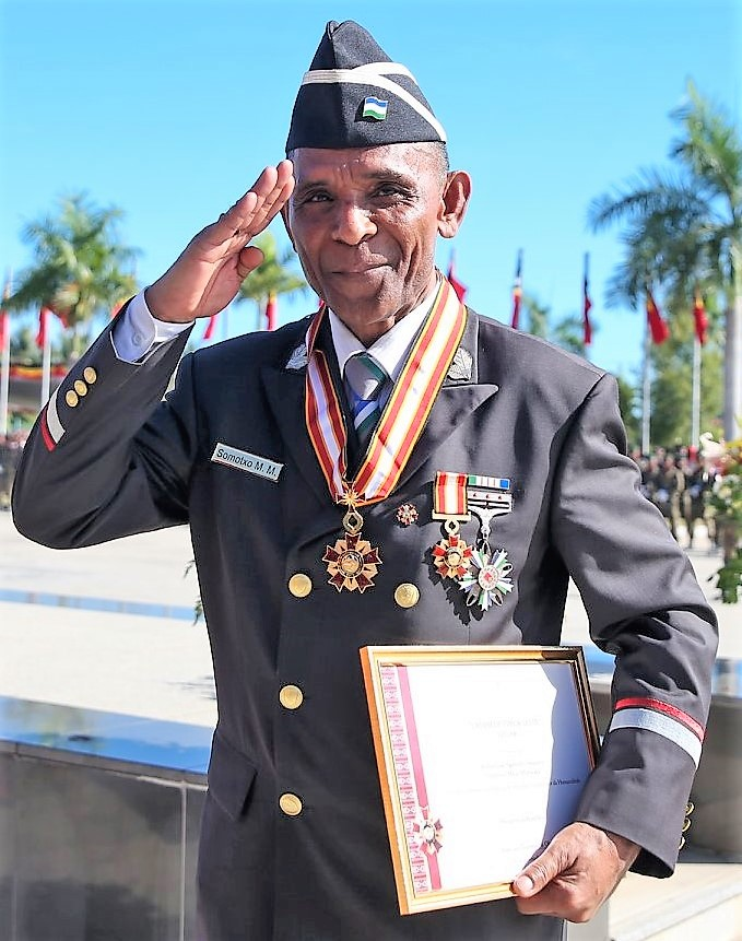 José Agostinho Sequeira, bei der Verleihung des Ordem de Timor-Leste (Collar)